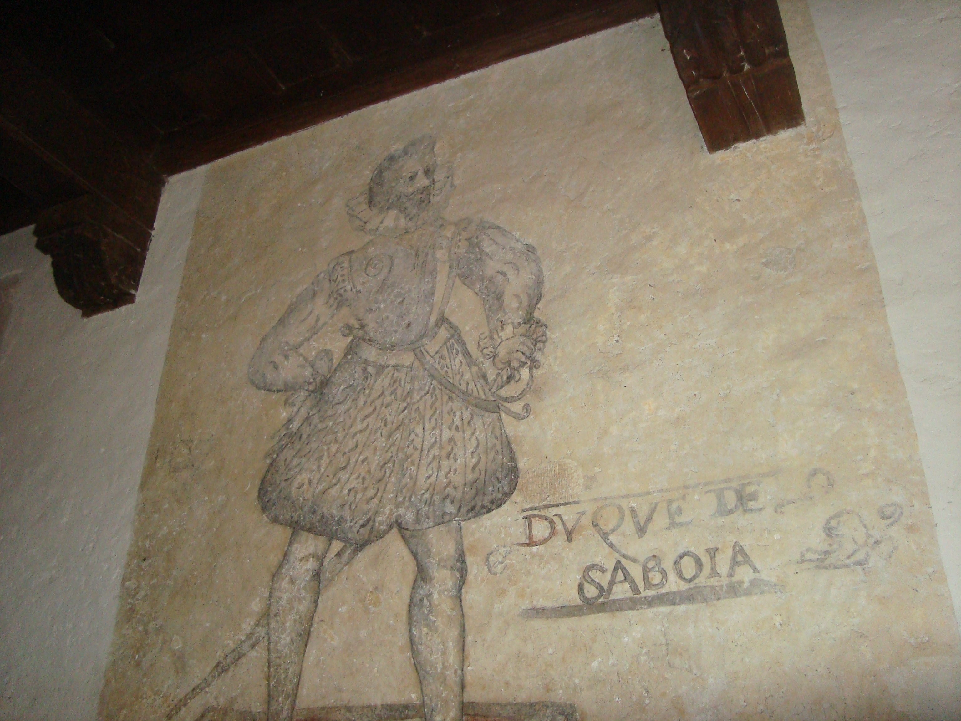 Duc de Saboia, grisalla mural, Albocàsser, Castelló